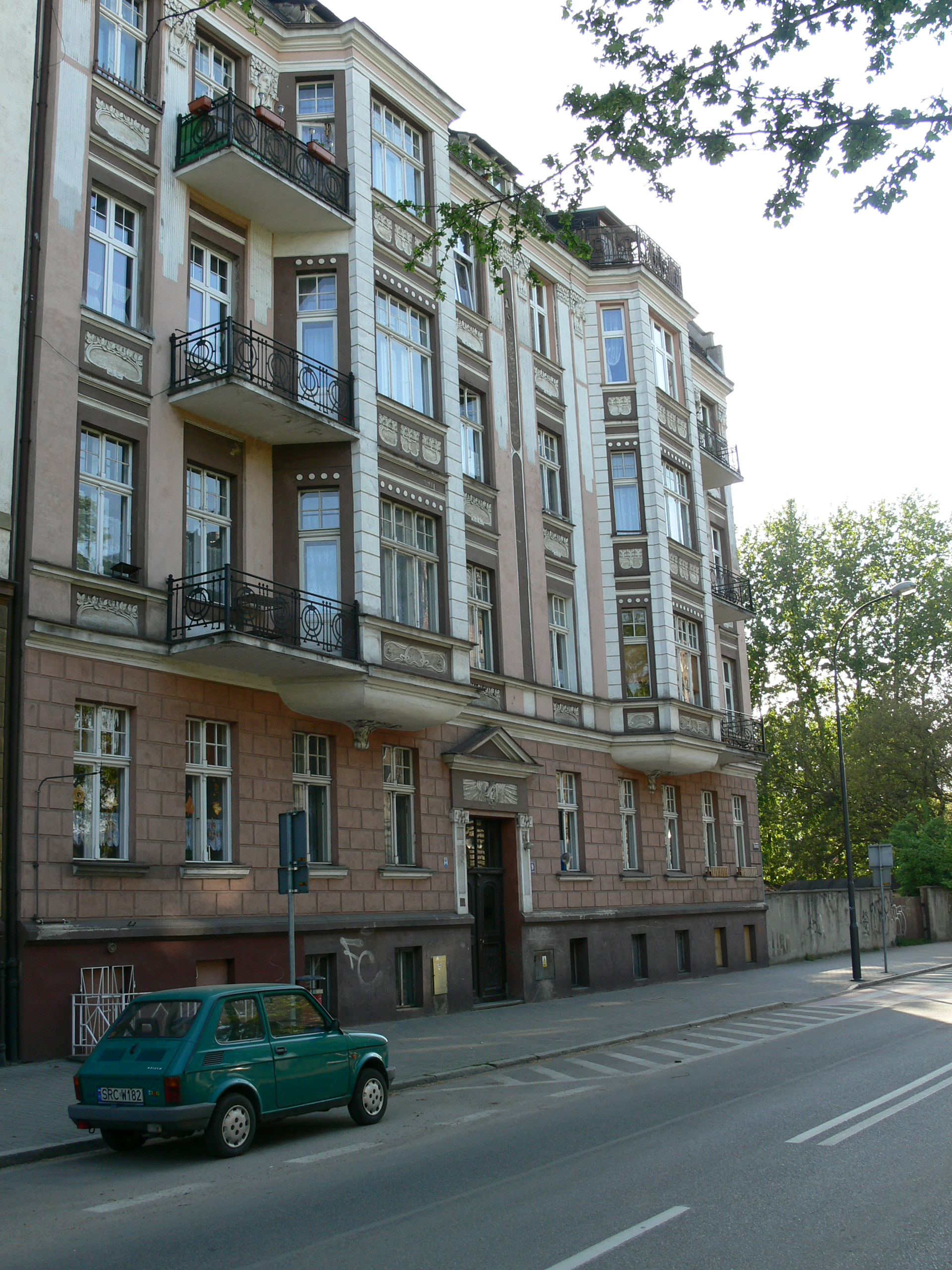 Racibórz - kamienica przy ul. Staszica 9